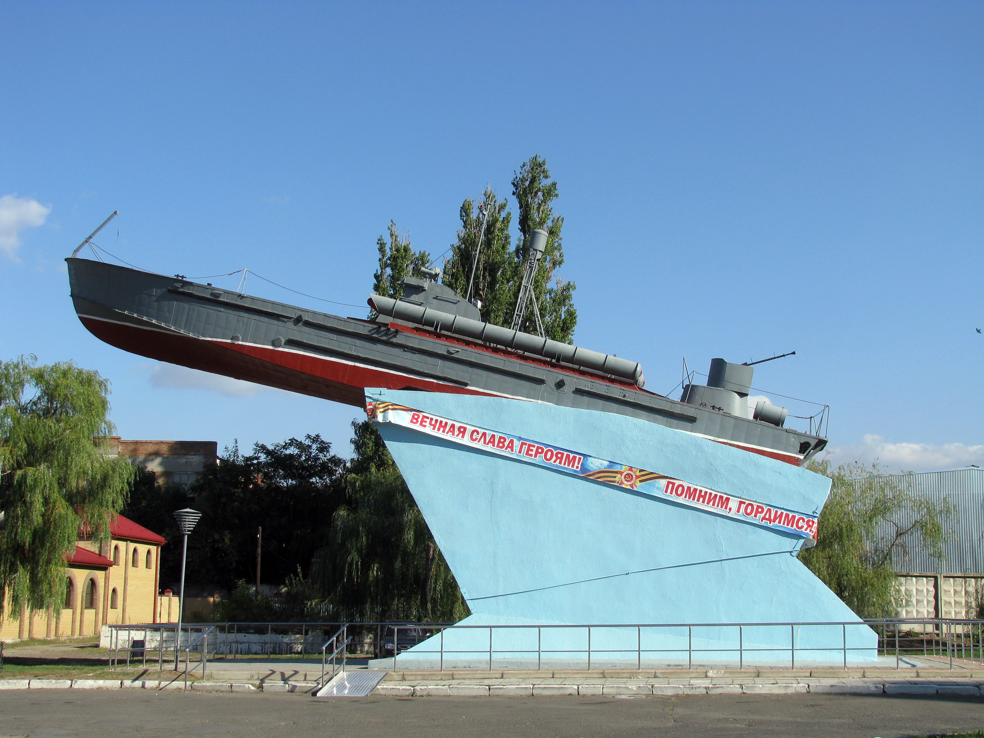 Памятник азовской военной флотилии: площадь речного вокзала, Азов, Ростовская область